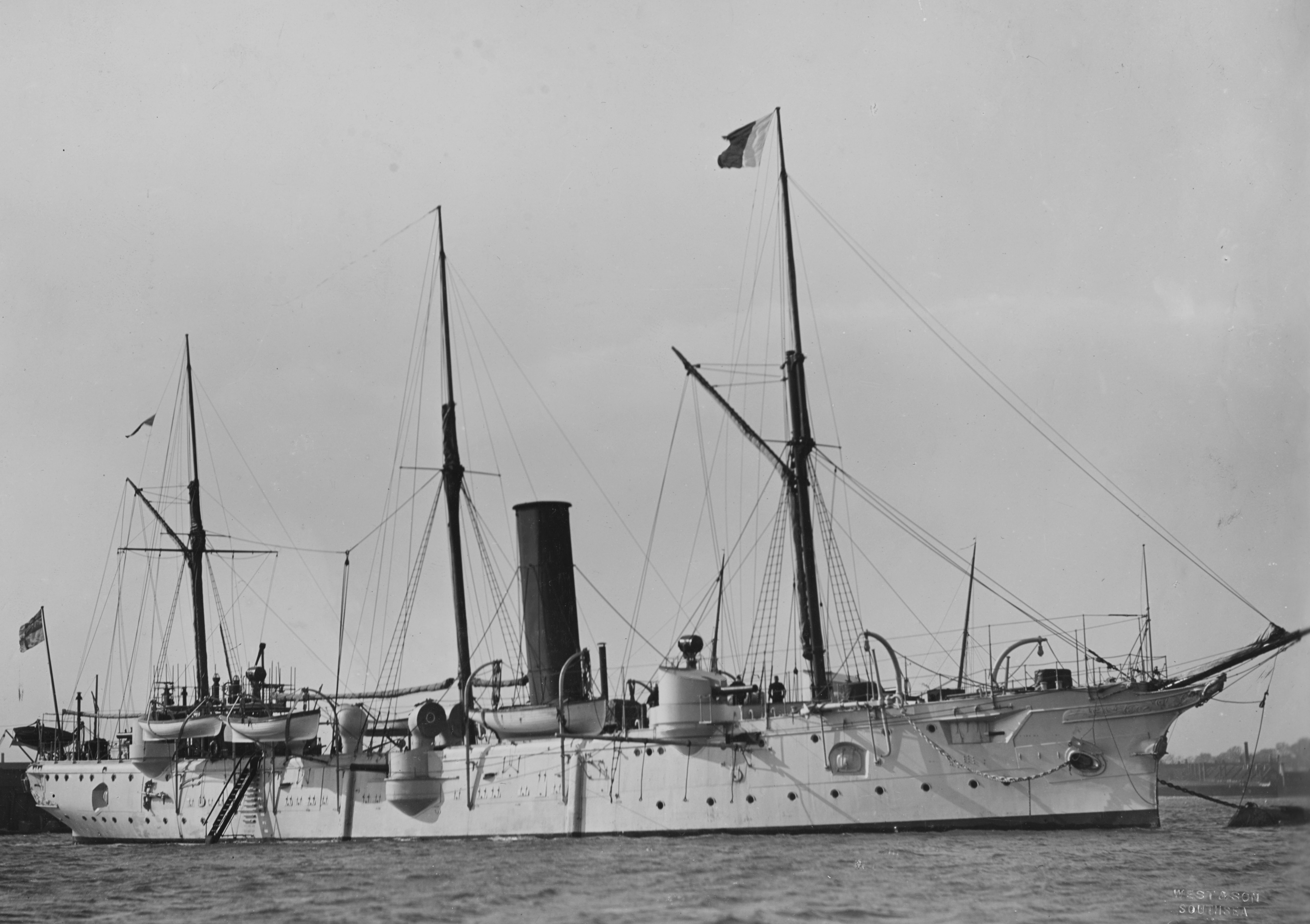 HMS Porpoise